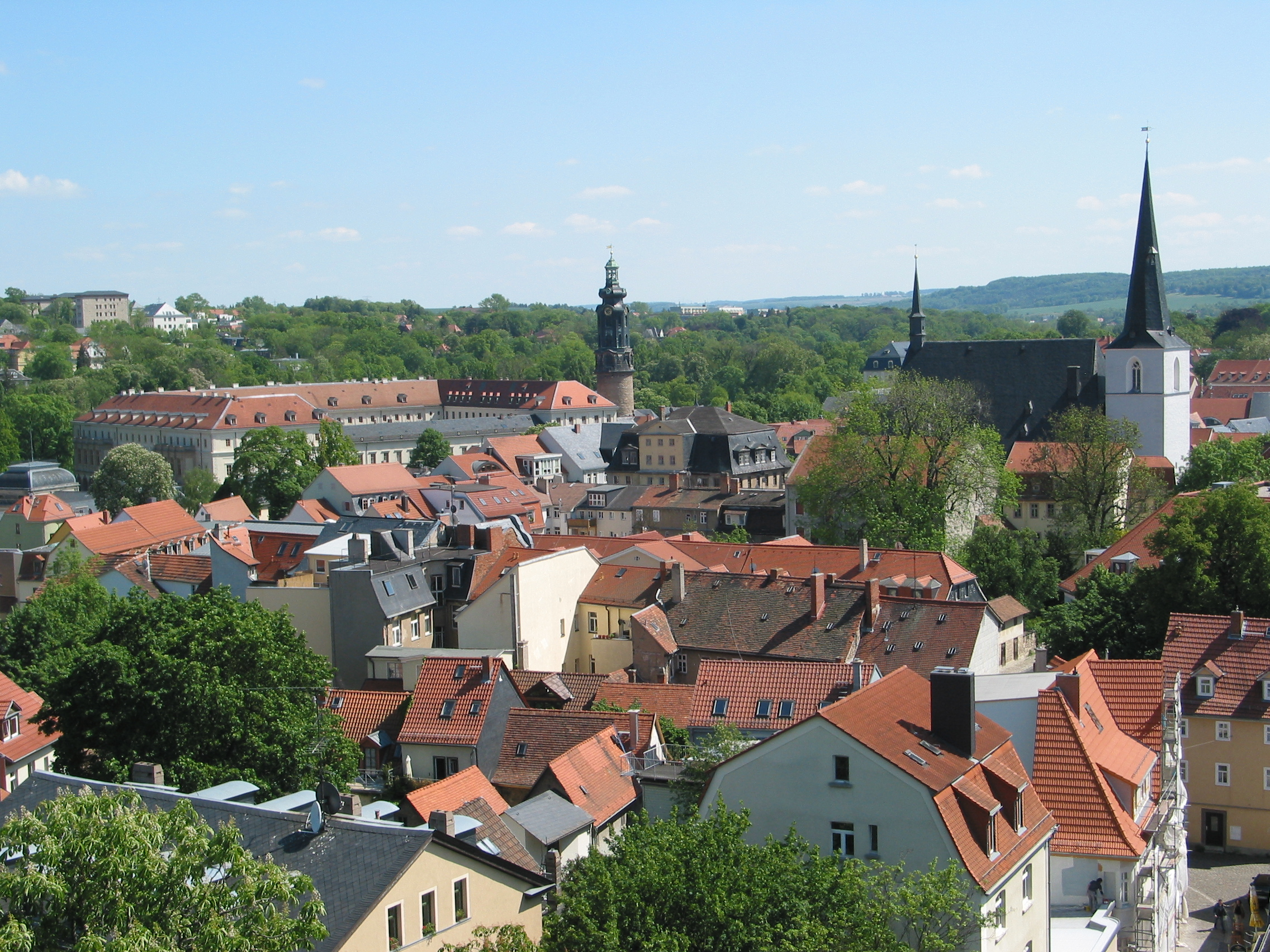 Blick vom Jakobskirchturm in südöstlicher Richtung zum Stadtschloss Weimar, rechts die Herderkirche.